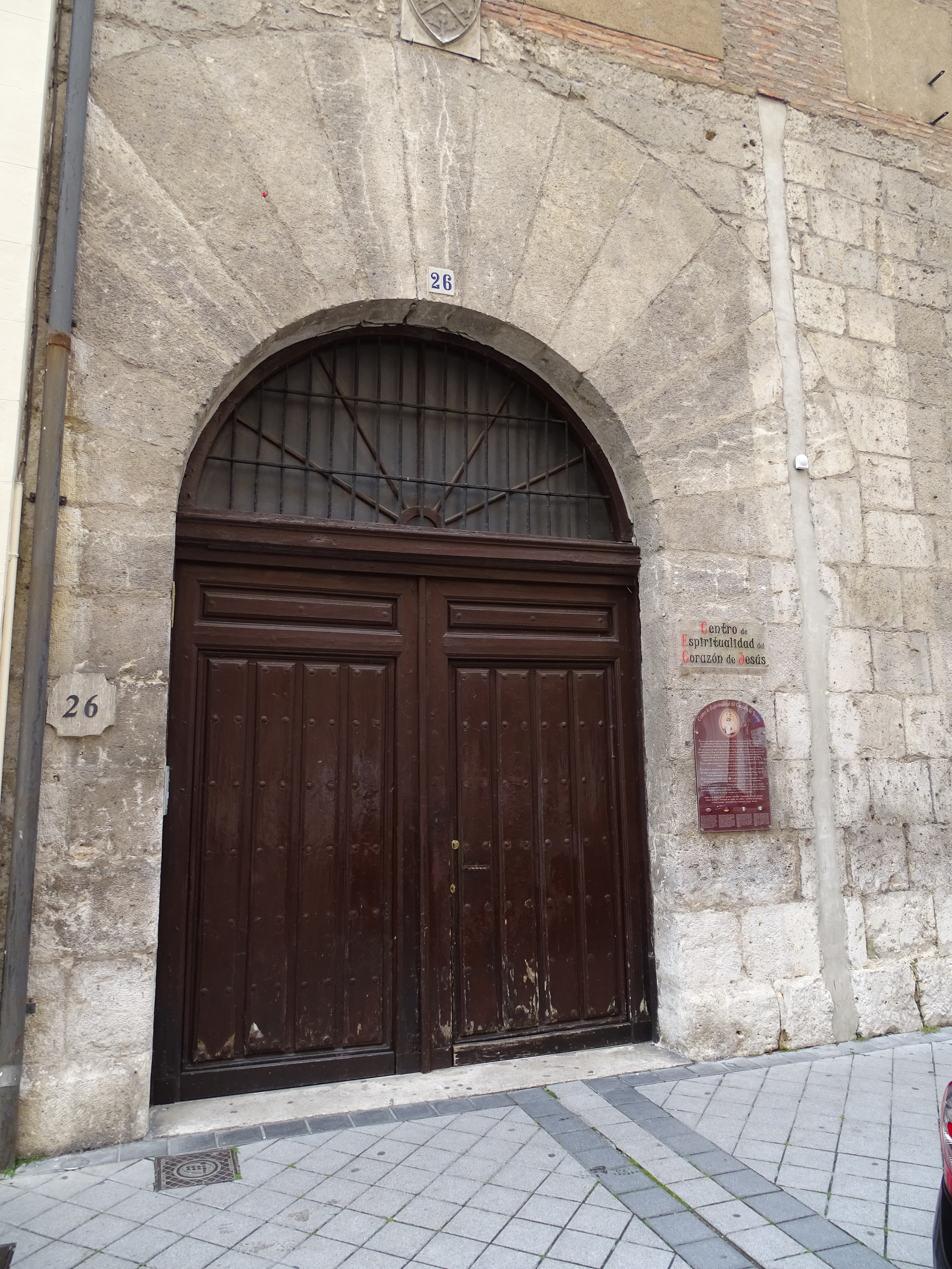 Antiguo Colegio de San Ambrosio en Valladolid (España)